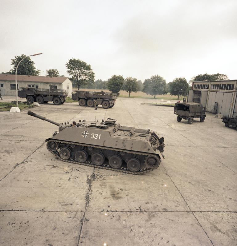 Reportage Bundeswehr Kanonenjagdpanzer, Munsterlager, KTrS III [Munsterlager, Truppenübungsplatz in der Lüneburger Heide]